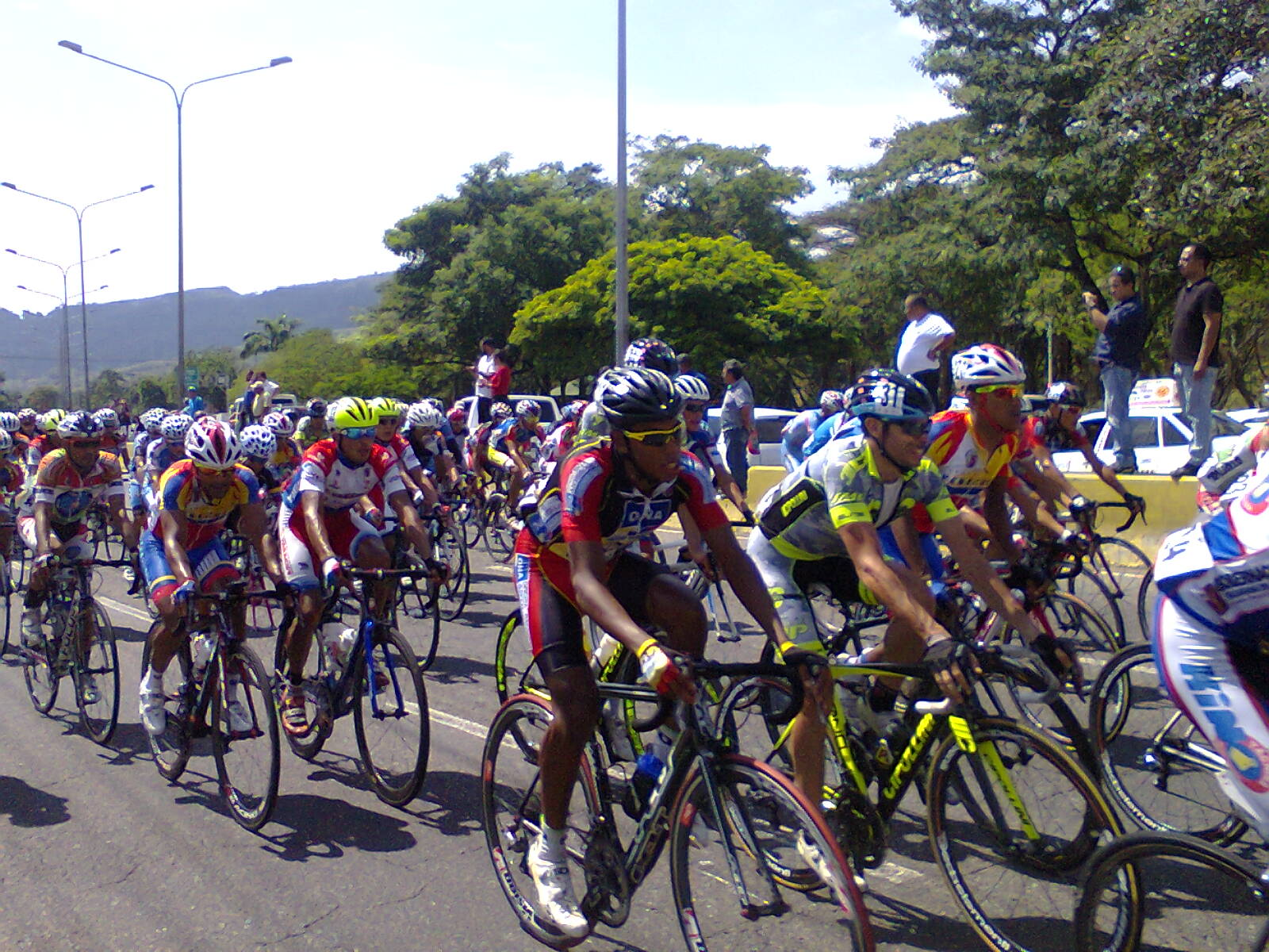 Participantes de la Vuelta al Táchira 2016 durante la Quinta Etapa (Abejales - Cerro el Cristo).